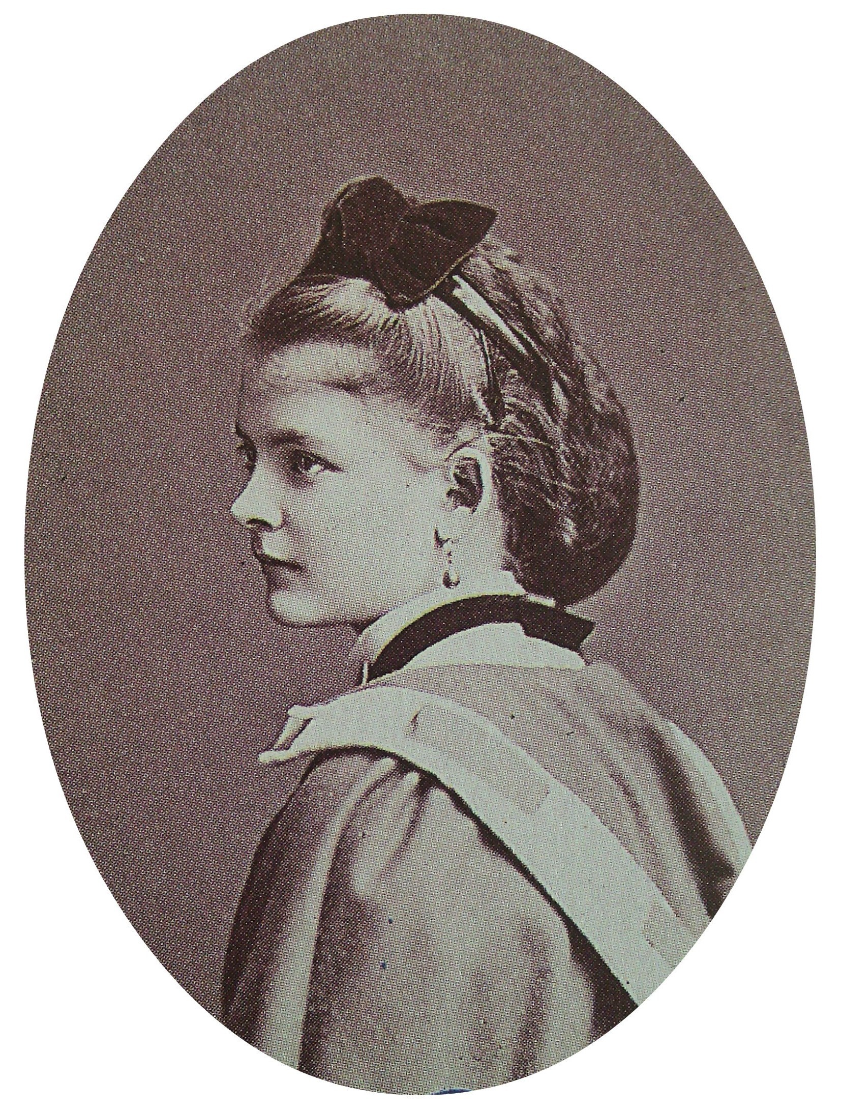 Варвара Петровна Орлова, ур. Шувалова (1850—1872), с 1868 года жена генерала Д. И. Орлова.